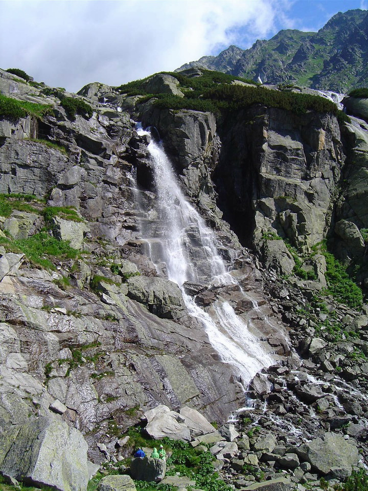 Vodopad Skok